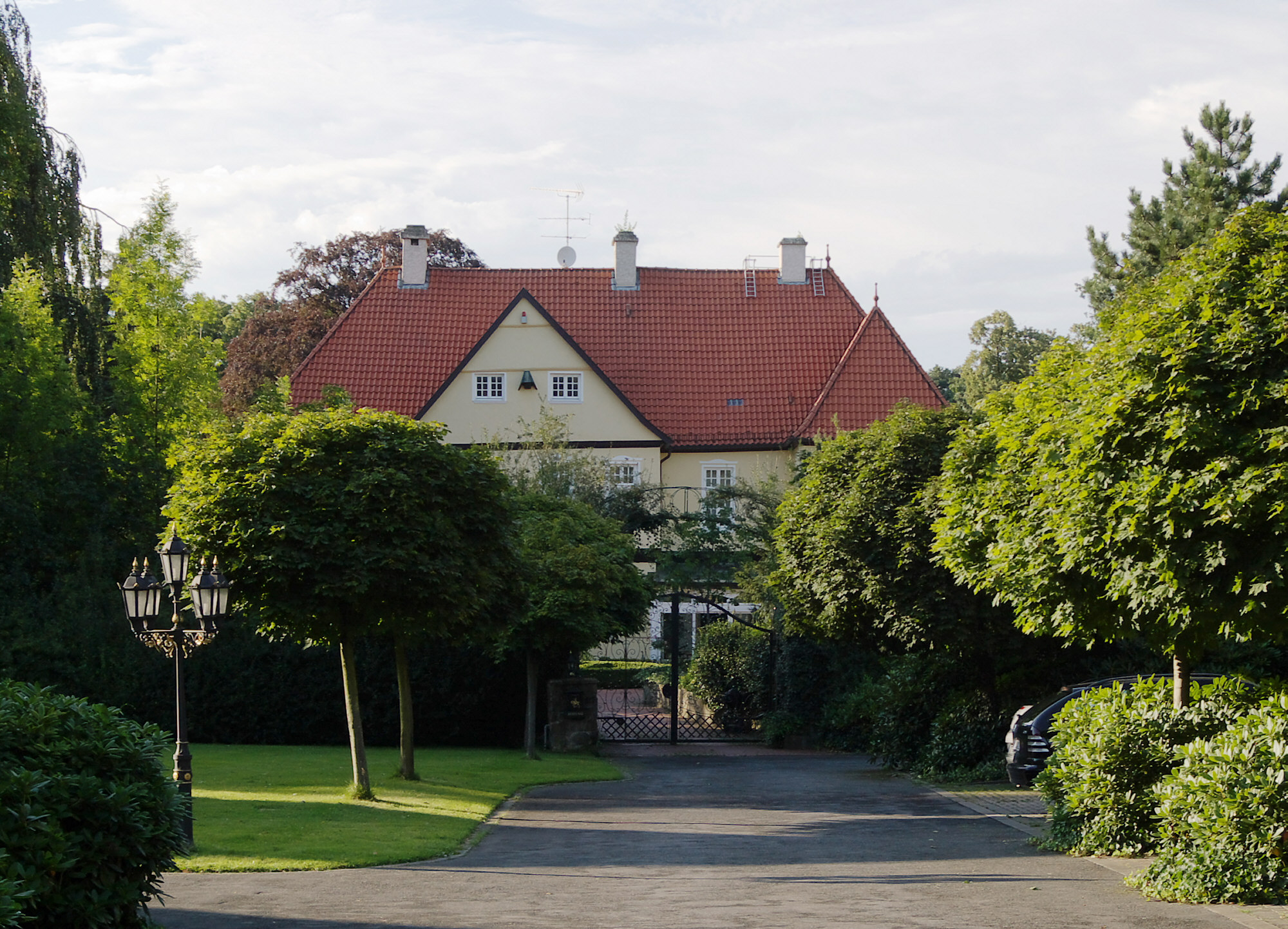 Eingangsbereich Haus Echthausen, Wasserschloß in Wickede (Ruhr)